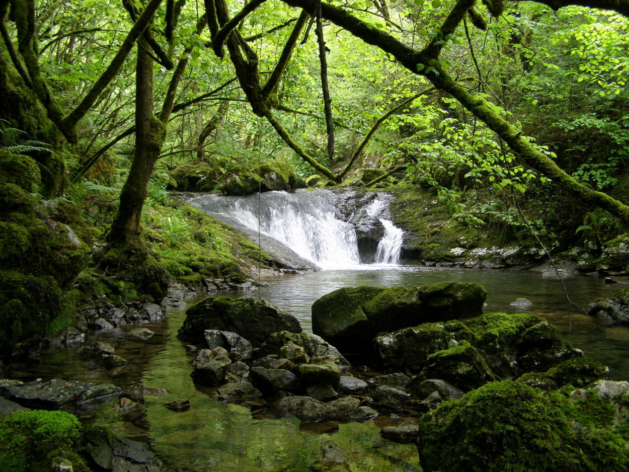 Cascada en el río Latarmá